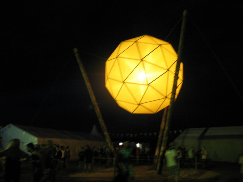 המבנה במרכזי של העיר "שמש" במחנה.